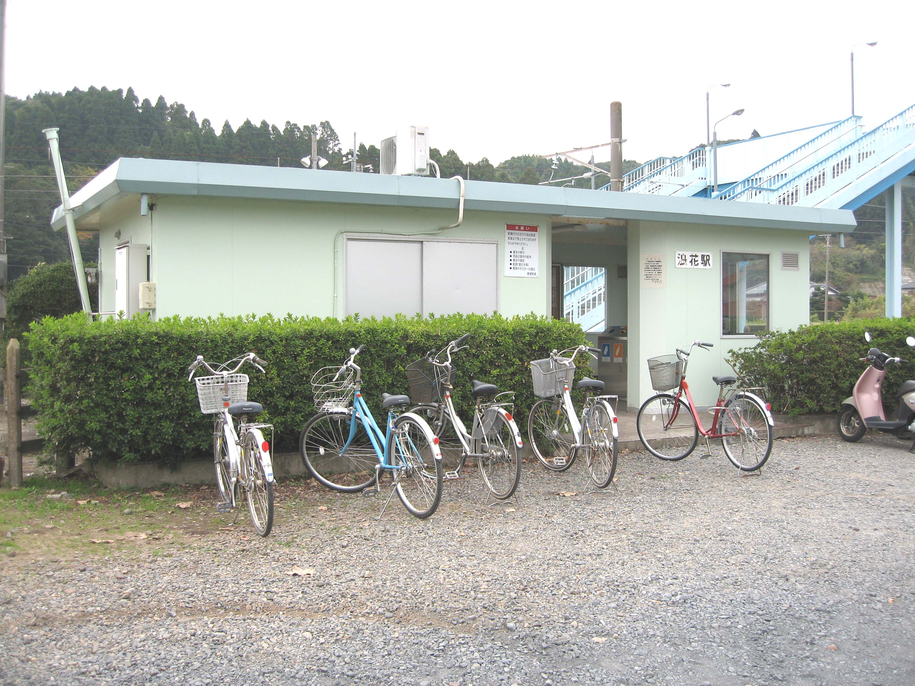 Namihana station, Sotobo Line, Chiba, Japan, 浪花駅駅舎